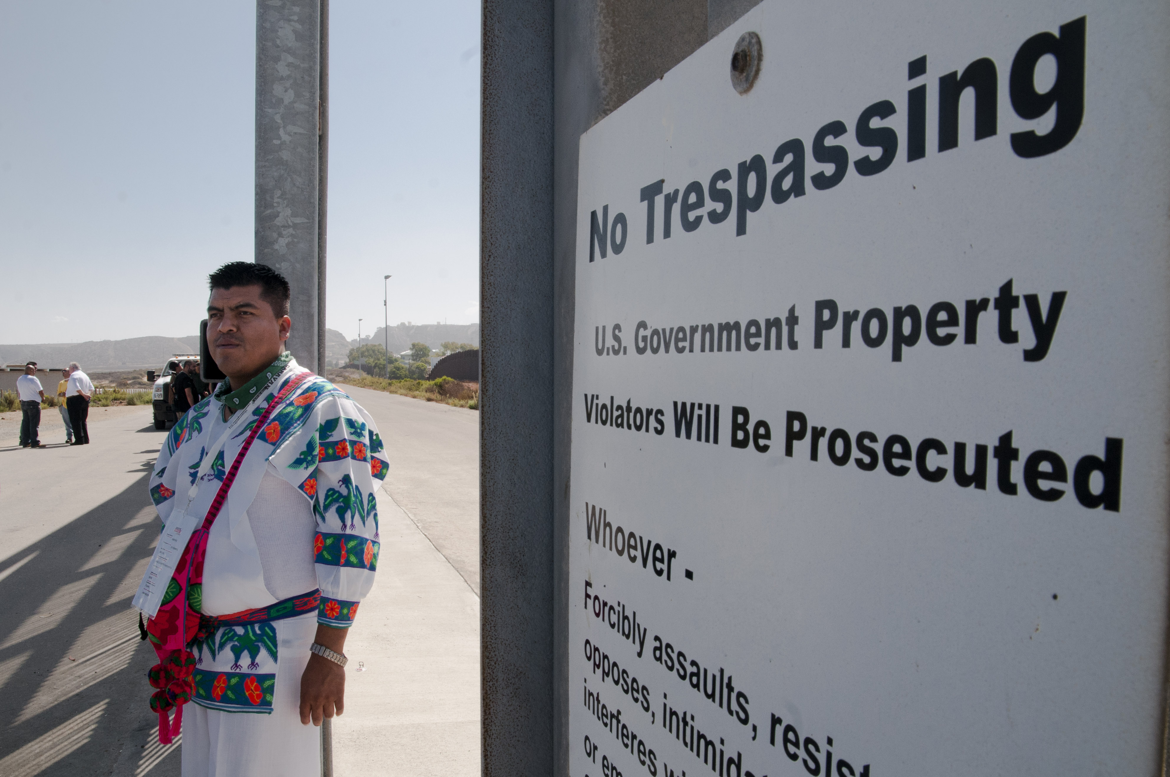 El rerpresentante de Wirikuta en la Caravana por la Paz se protege de la sombra recargado en la reja de la frontera entre México y Estados Unidos. El "Parque de la Amistad" se encuentra siempre cerrado, pero las autoridades estadounidenses lo abrieron hoy para que pudiésemos acceder.